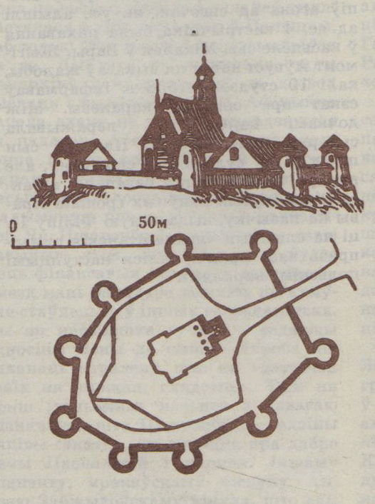 Беларуская (тарашкевіца): Абмерны рысунак кальвінскага збору ў Койданаве Юзэфа Ядкоўскага